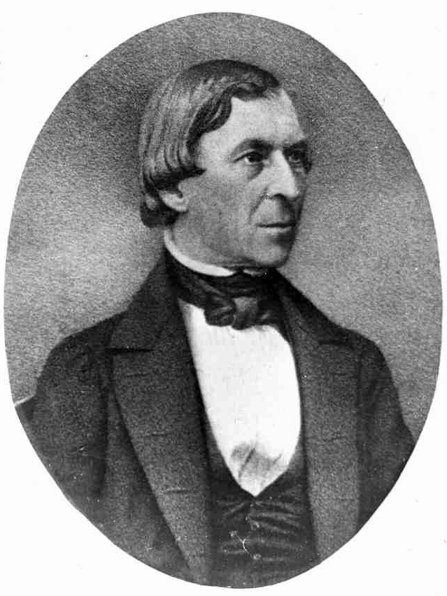 Куторга, Степан Семёнович